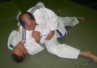 kata kesa gatame